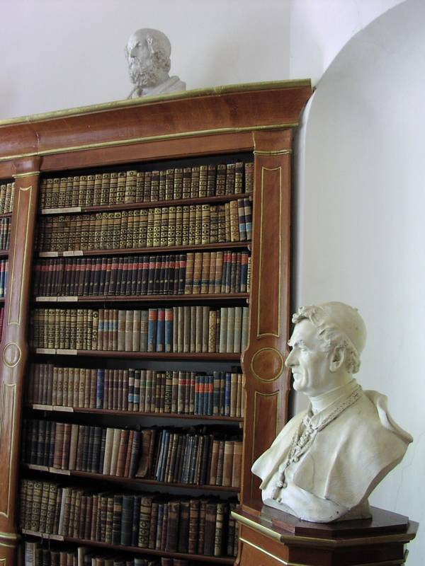 A székesfehérvári Püspöki Könyvtár részlete